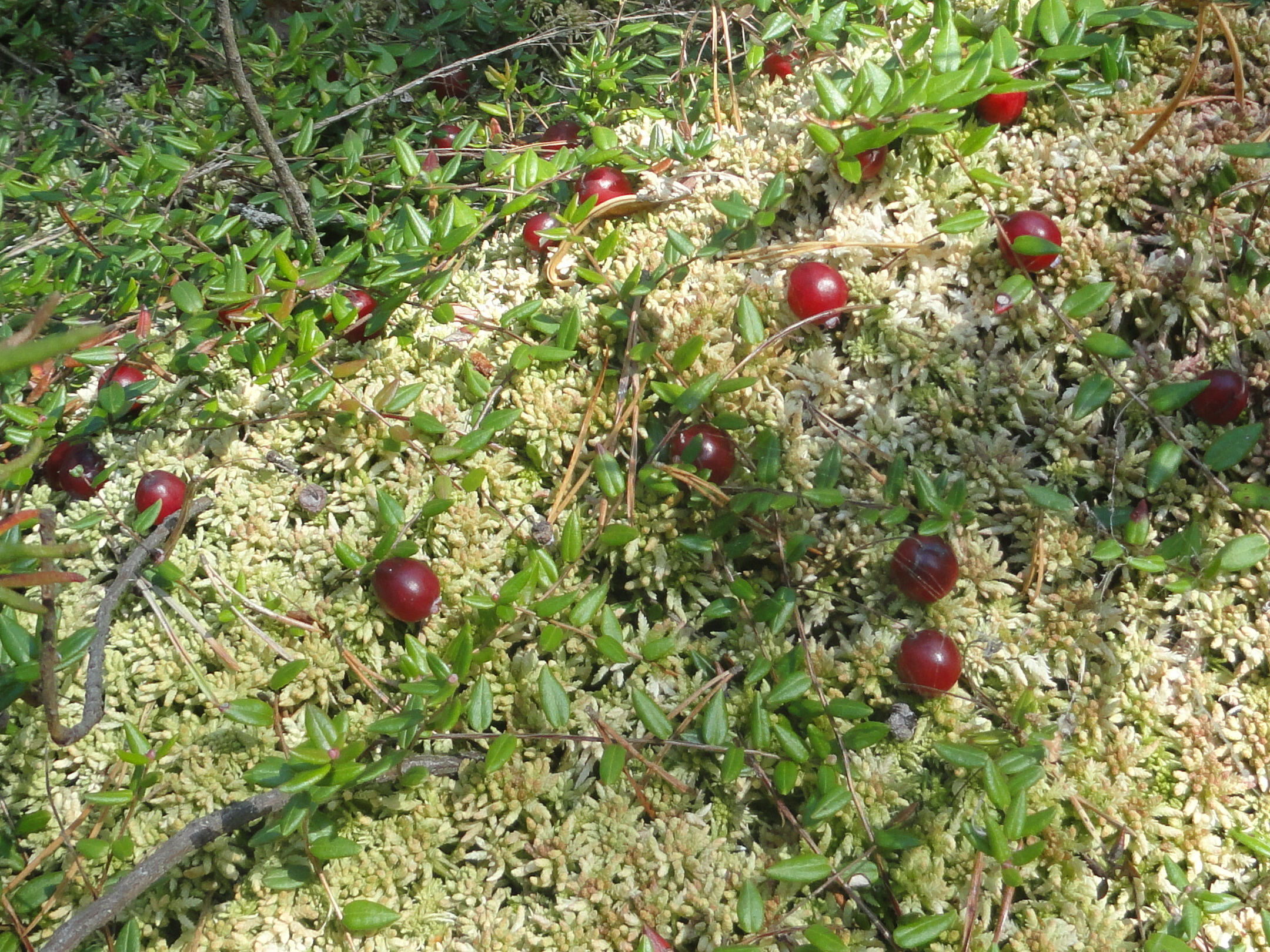 Клюква во мху на болоте (Воничи, Могилёвская область, Беларусь)